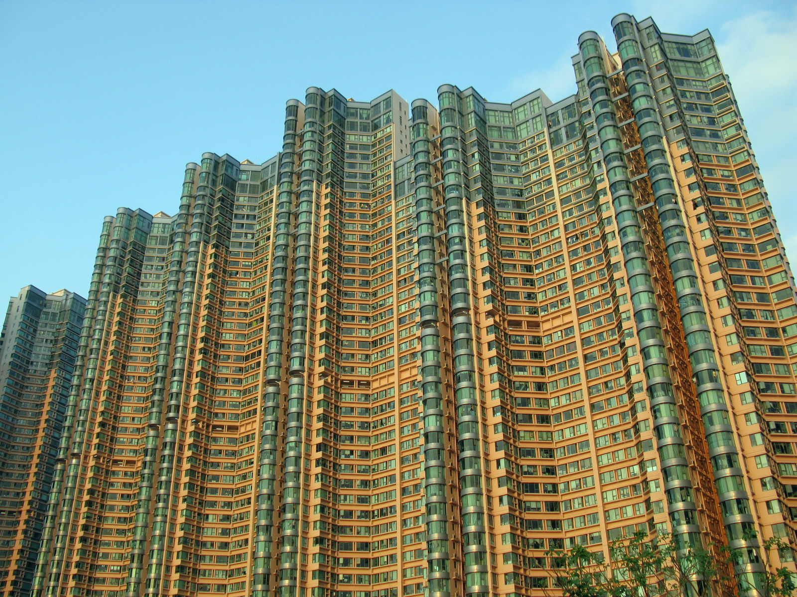 大角咀 柏景灣 Park Avenue, Tai Kok Tsui